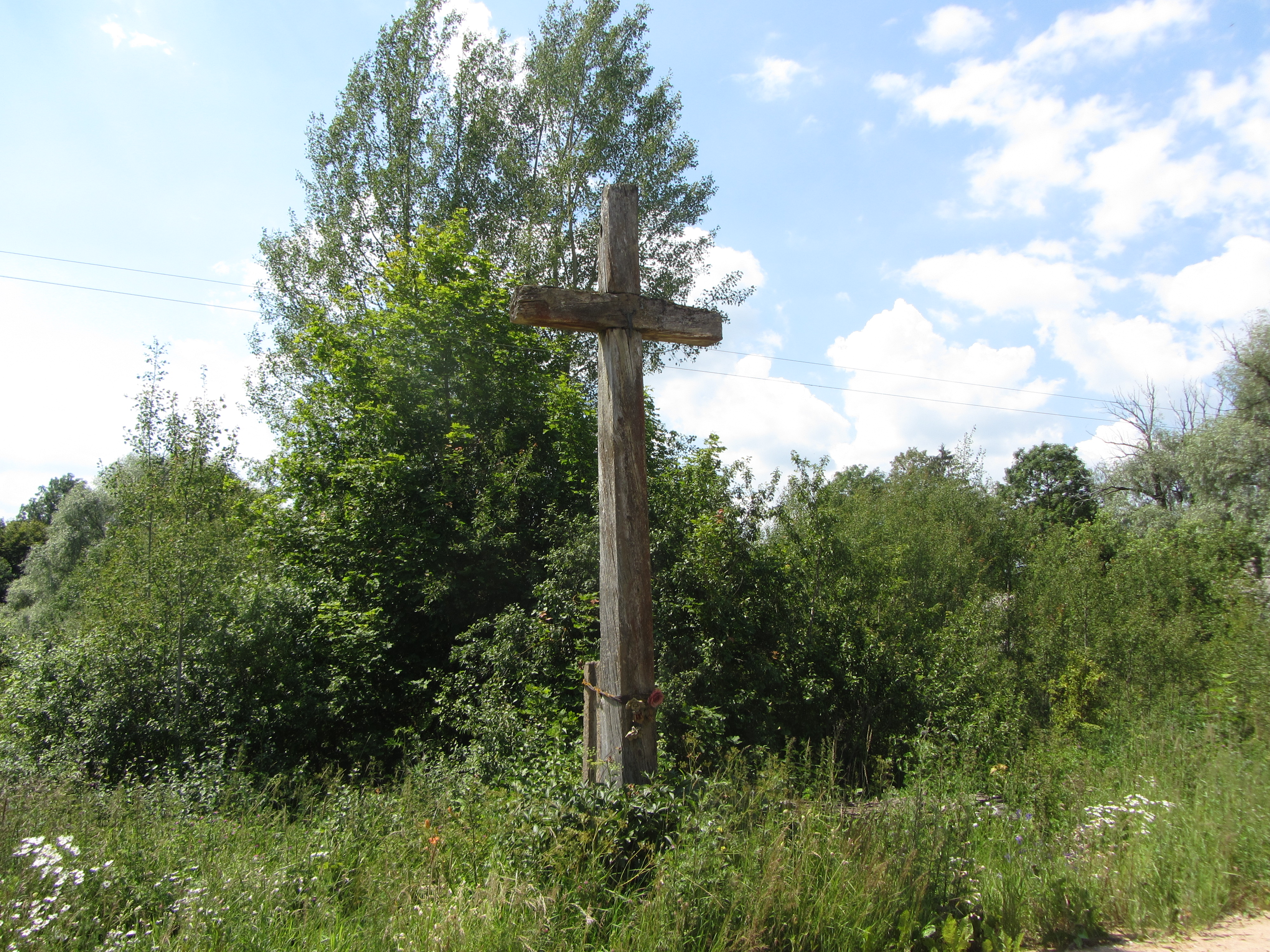 Pociūnai 30281, Lithuania